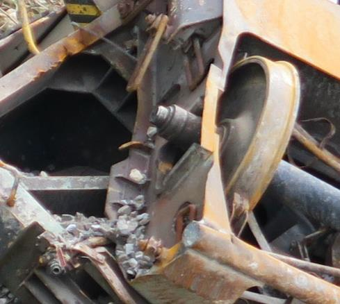 Drehgestell des drittletzten Wagens des Unfallzuges von Daillens, bei dem eine Blattfeder und ein Radsatzlager fehlen.